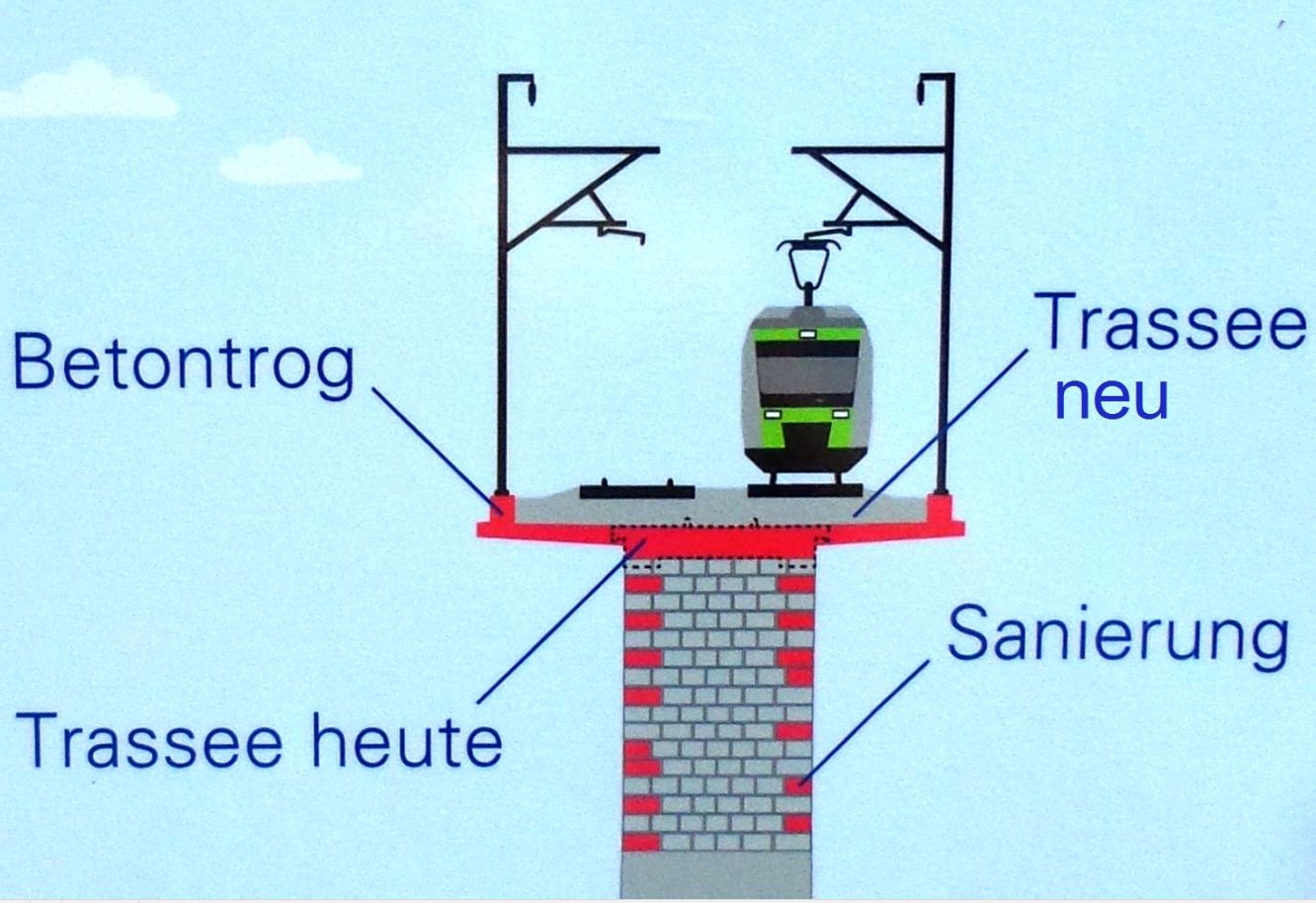 Saane-Viadukt: Sanierung und Trasseverbreiterung für zwei Gleise; Informationsplakat der BLS AG